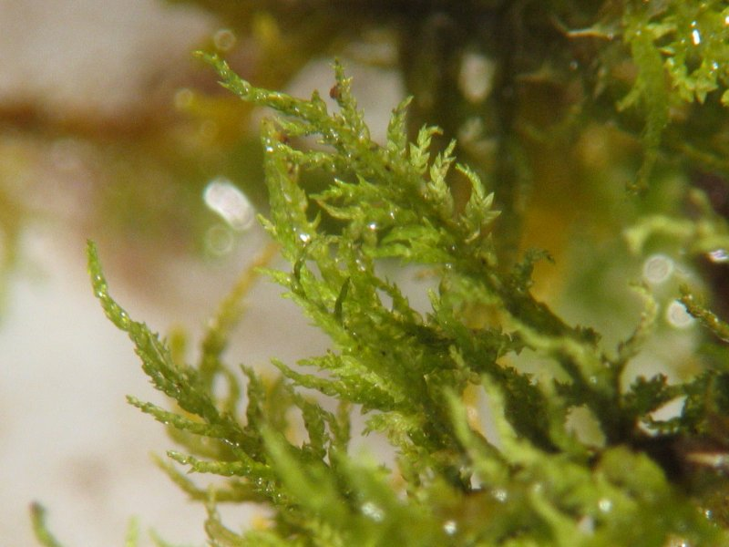 Haarspitzen-Thujamoos (Thuidium philibertii), Detailaufnahme (10x), feucht